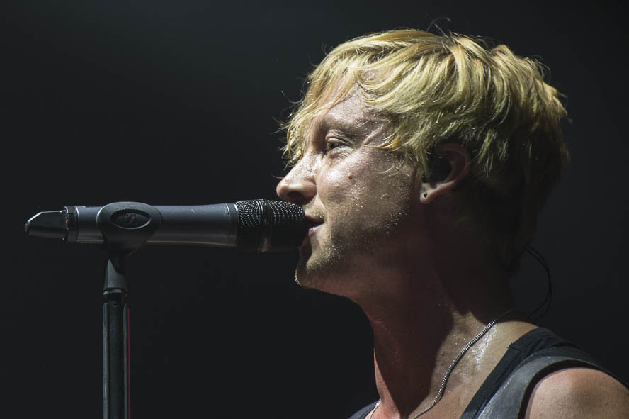 Livekonzert,Livemusik,Samu Haber,Sunrise Ave,Sunrise Avenue,Zeltfestival Ruhr